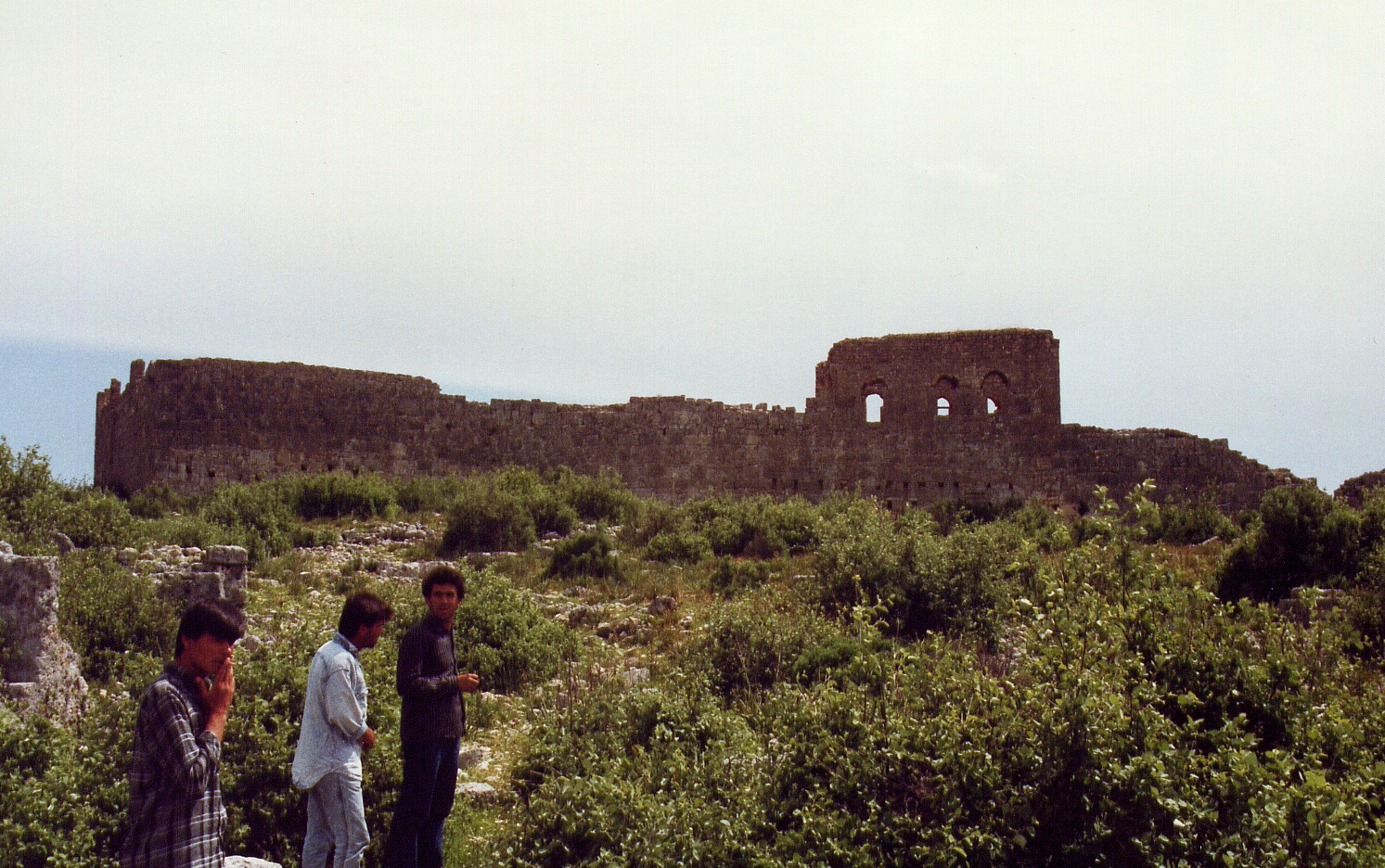 Akropolis von Sillyon, Südtürkei bei Antalya